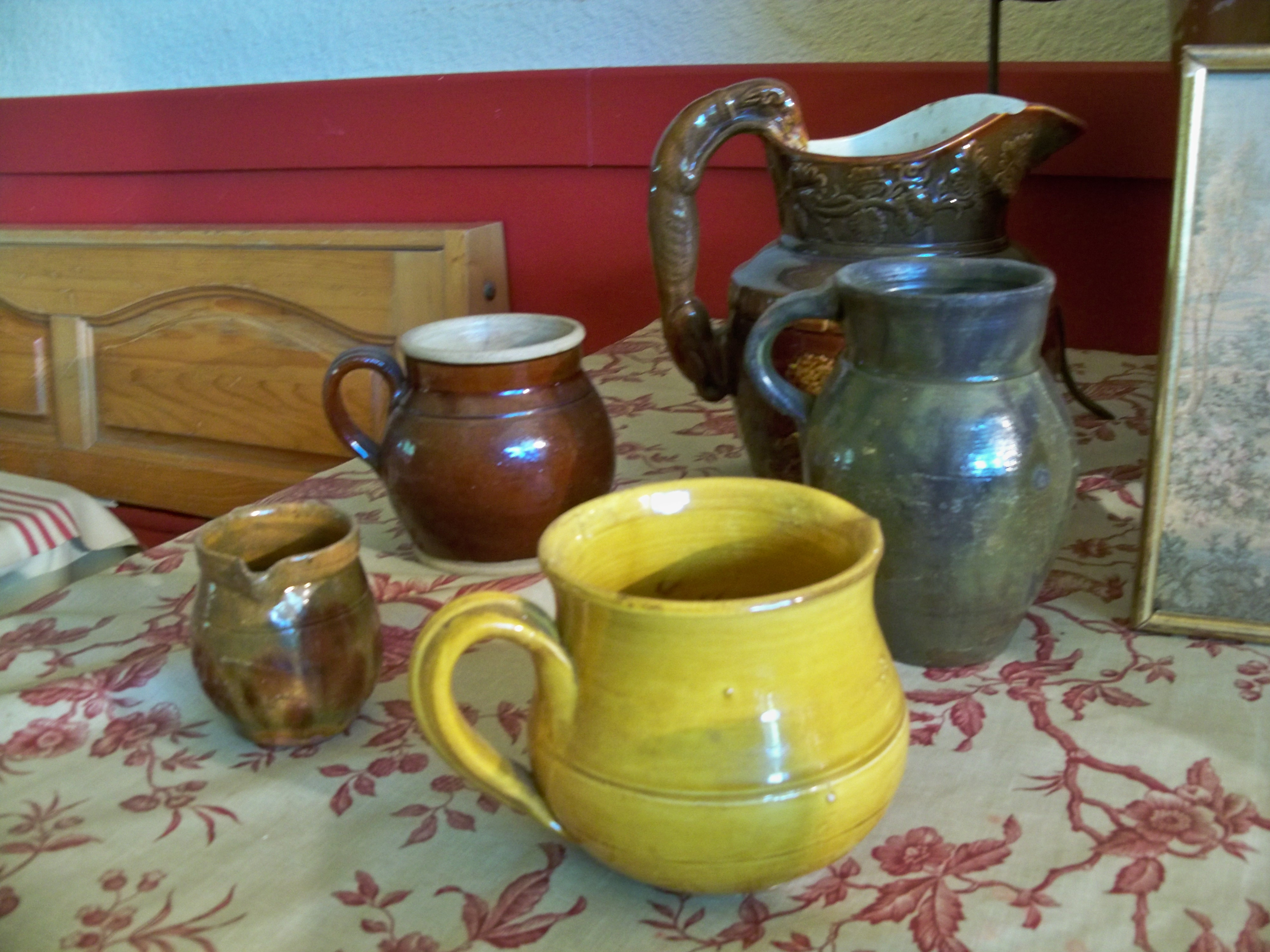 Brocs au Resto de la gare de Bonnieux